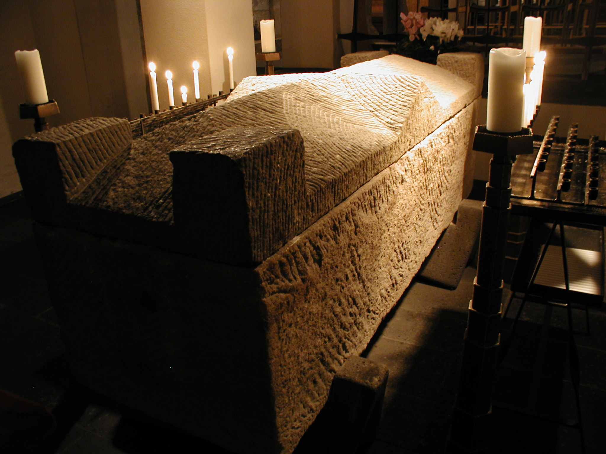 Köln, St. Andreas Krypta: Grab des Albertus Magnus